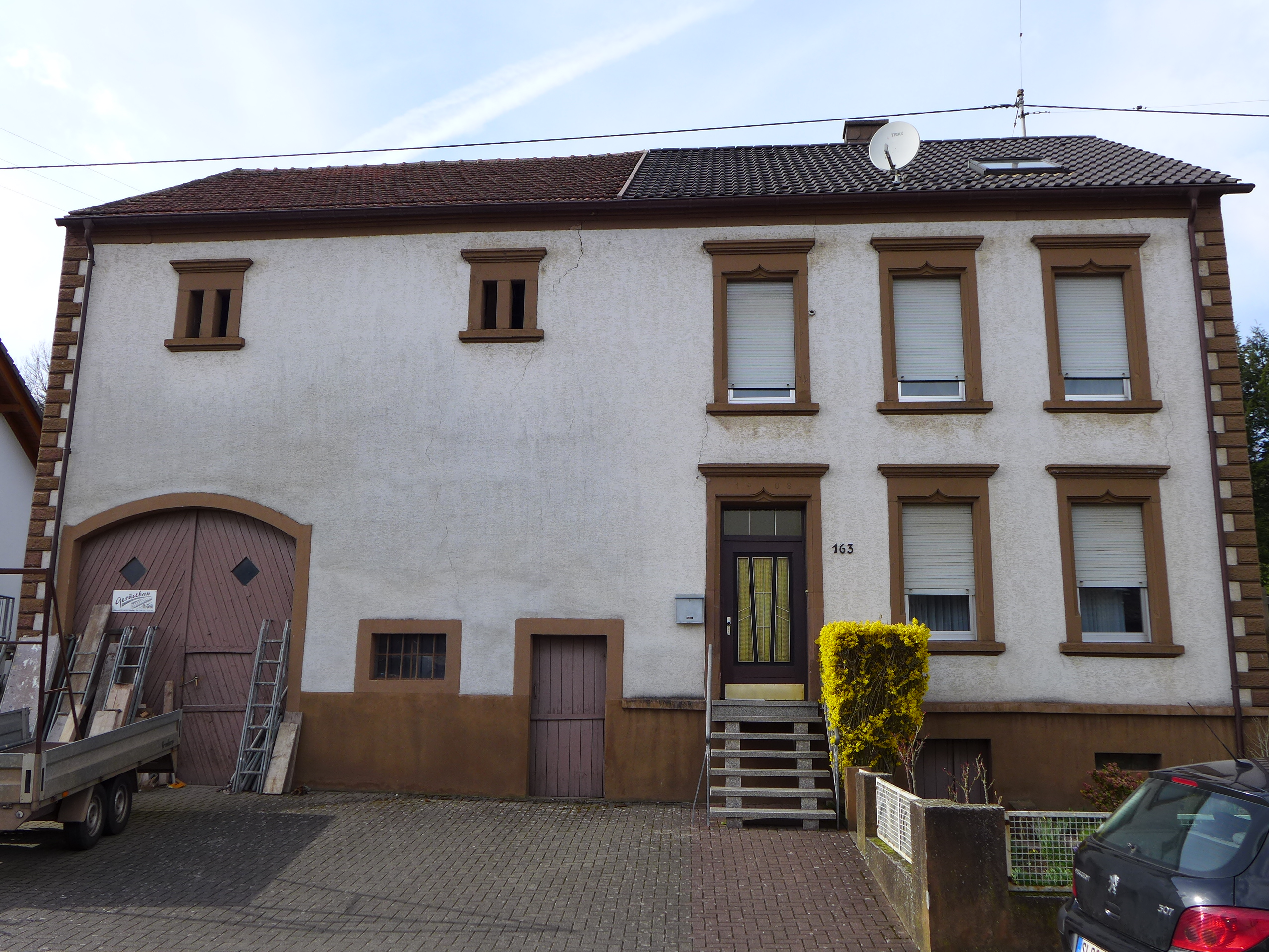 Diefflen, Traditionelles Südwestdeutsches Quereinhaus in der Nalbacher Straße (Kirchenweg)